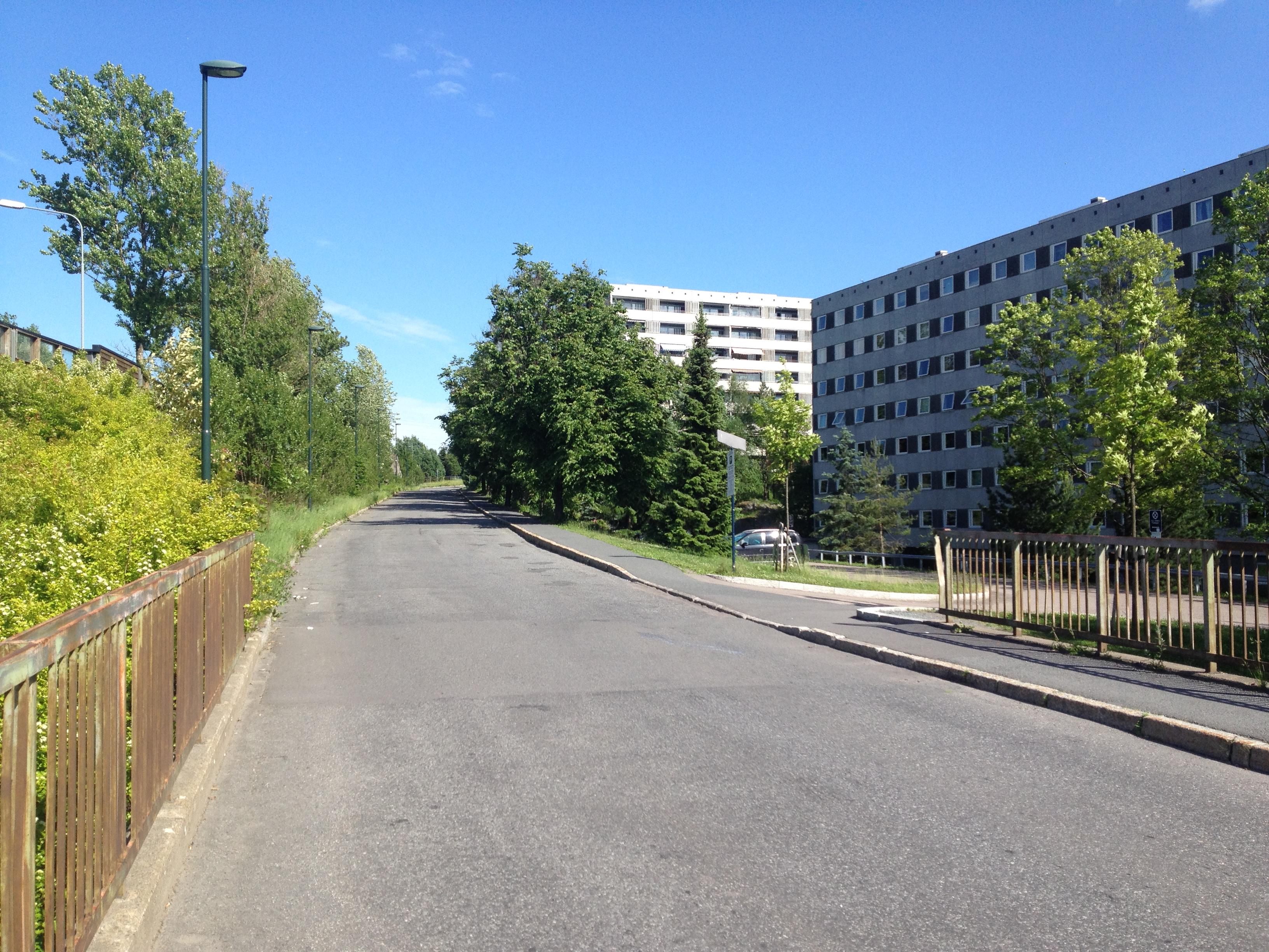 Garver Ytteborgs vei